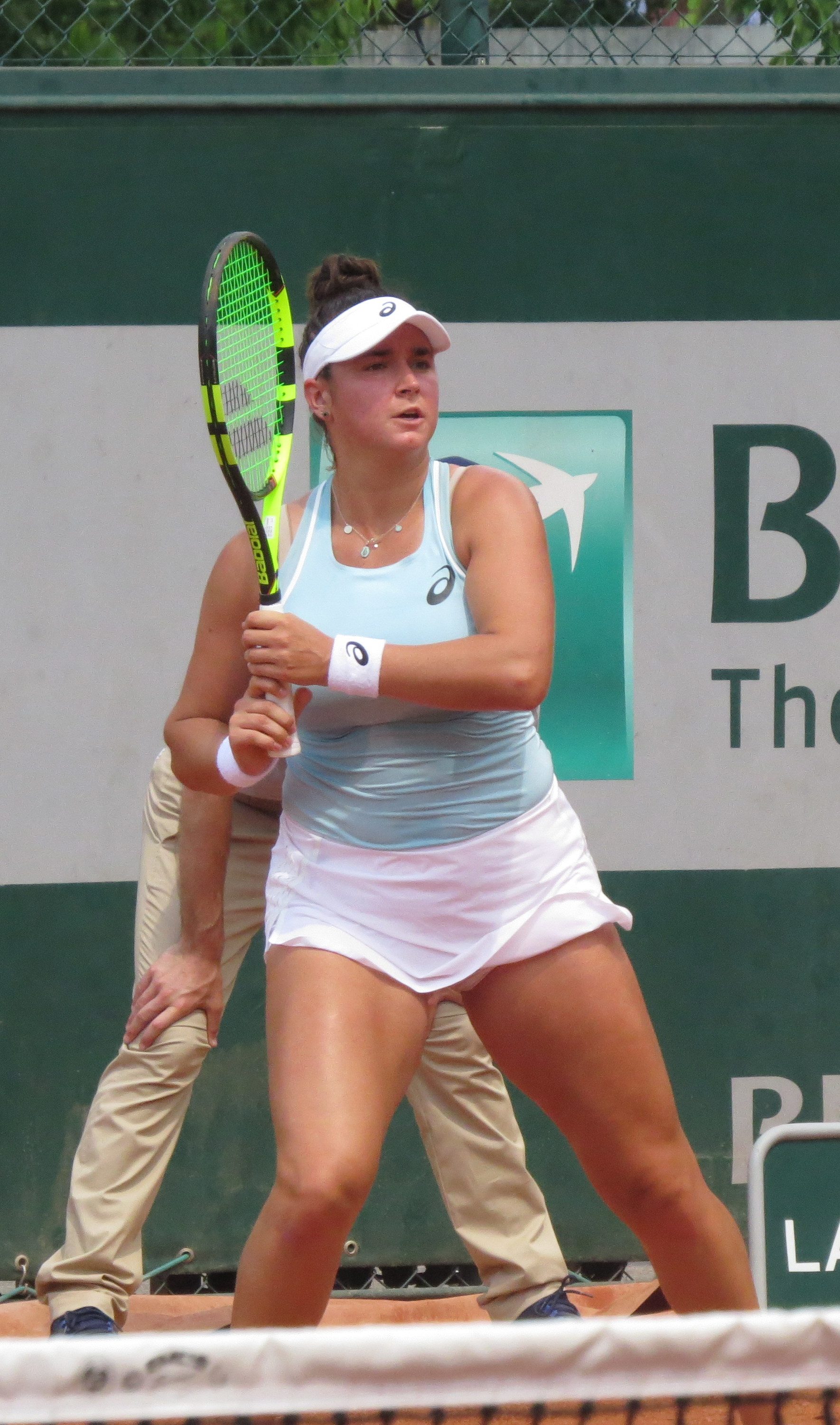 Caroline Dolehide lors de son premier tour des qualifications face à Irina Falconi (court n°12).